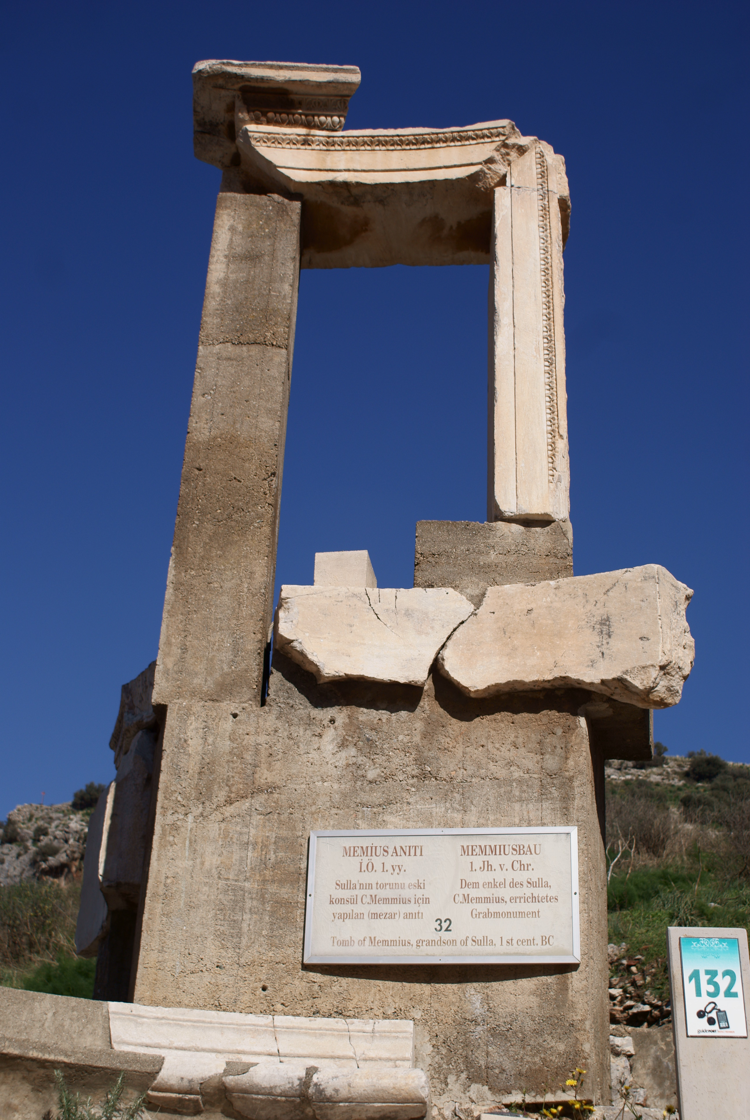 Efes (Ephesos) - MEMMIUSBAU